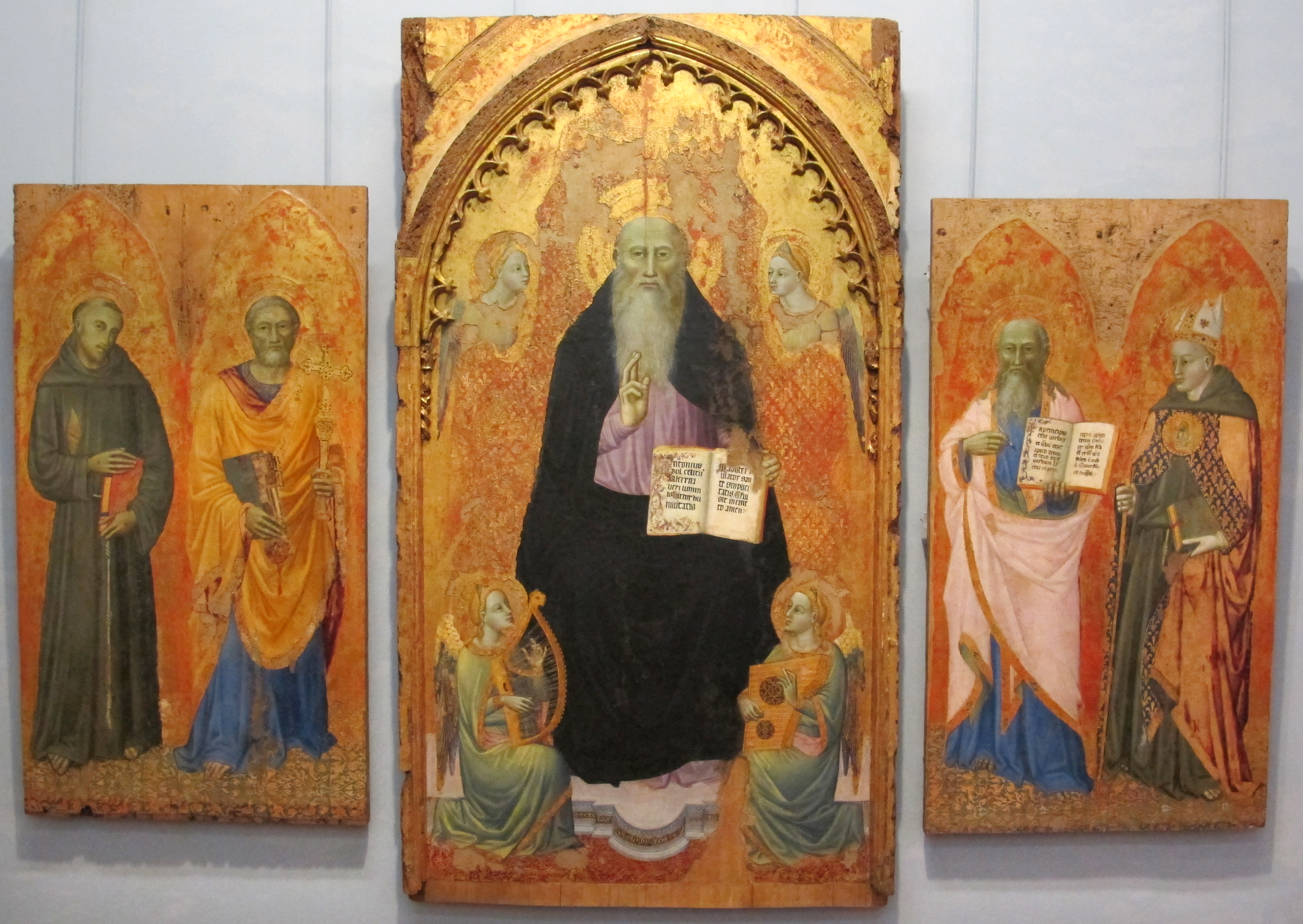 Galleria Napoletana (Museo di Capodimonte)